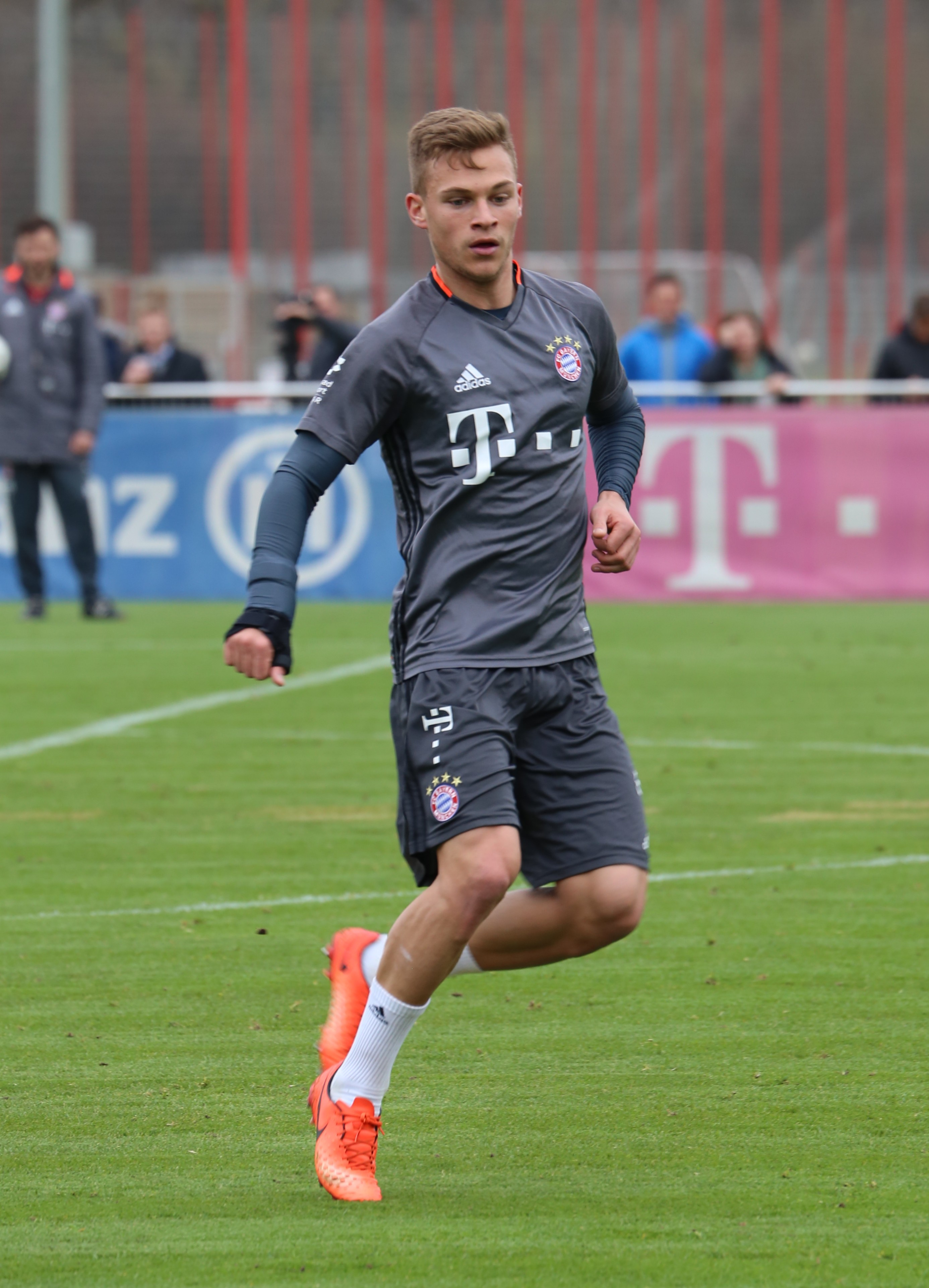 Joshua Kimmich am 14. März 2017 beim Training auf dem Gelände des FC Bayern München